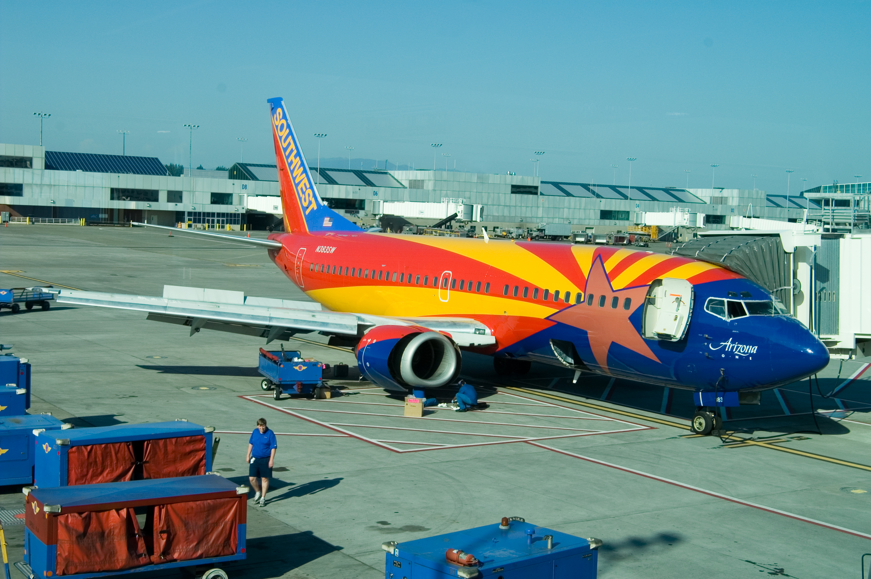 Boeing 737-3H4